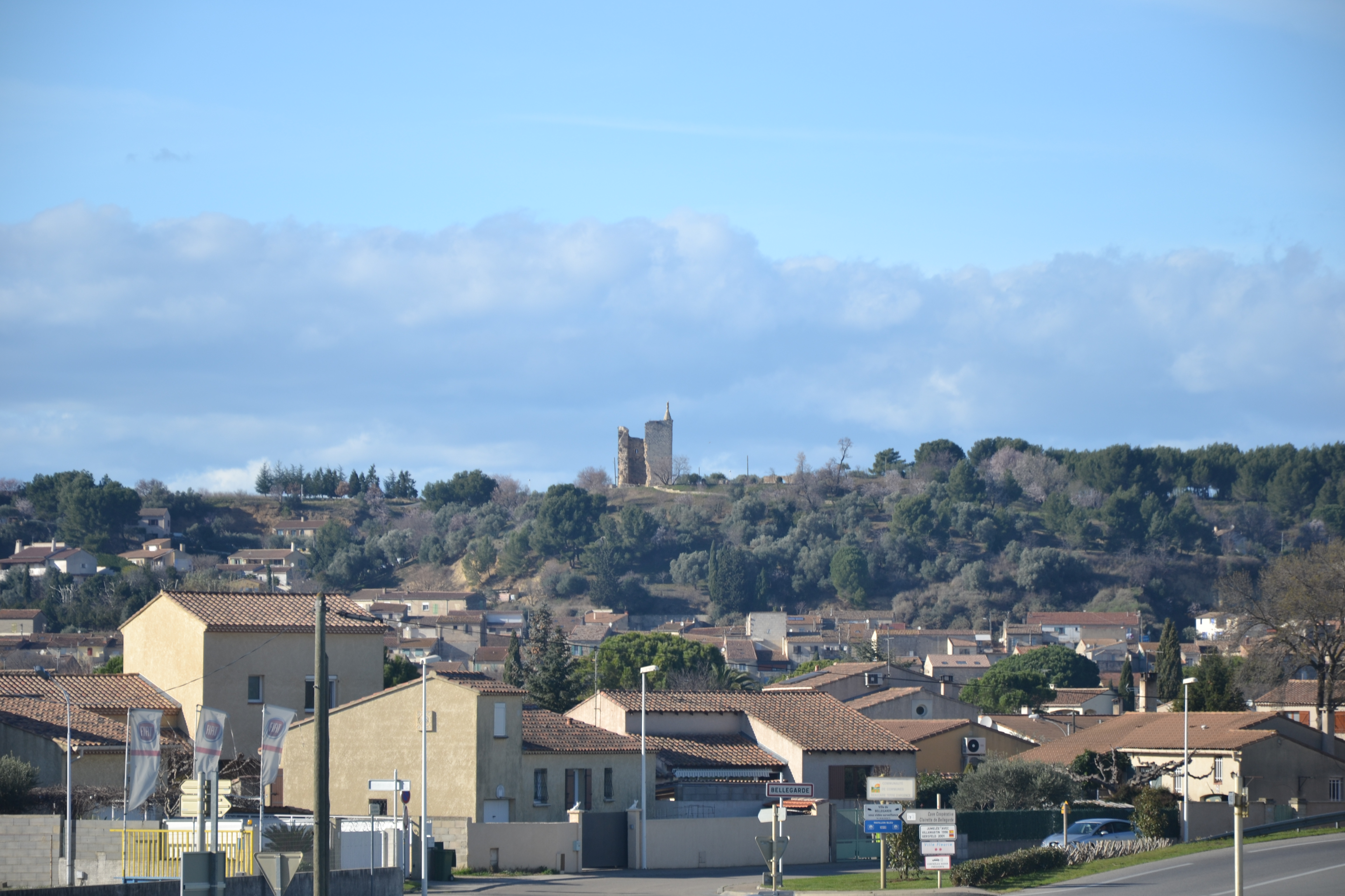 Tour à Bellegard